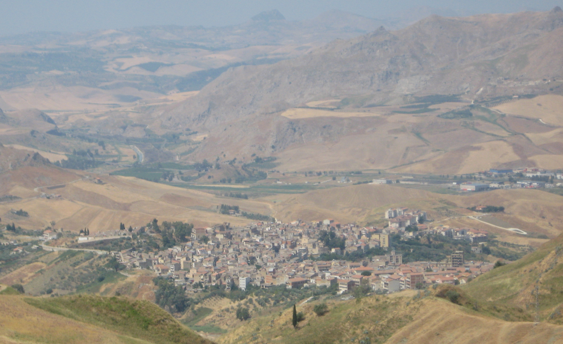 Panorama di Campofranco (provincia di Caltanissetta, Sicilia, Italia)